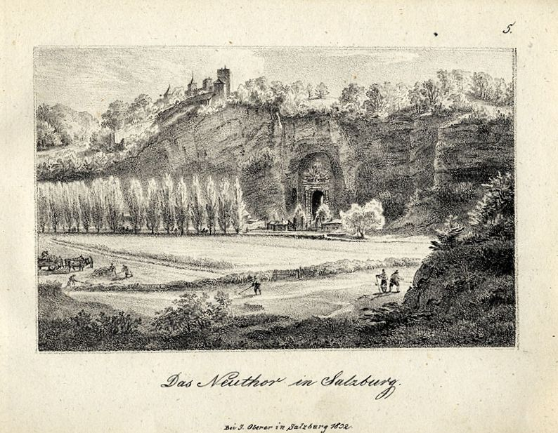 Lithographie aus: Die zwölf Stadt-Thore Salzburgs. Zu sehen ist das zu dieser Zeit noch unverbaute Gebiet hinter dem Sigmundstor (Neutor) auf der der Altstadt abgewandten Westseite des Mönchsbergs, das zum heutigen Stadtteil Riedenburg, im Speziellen zur Inneren Riedenburg im Bereich Hildmannplatz, Bucklreuth gehört.